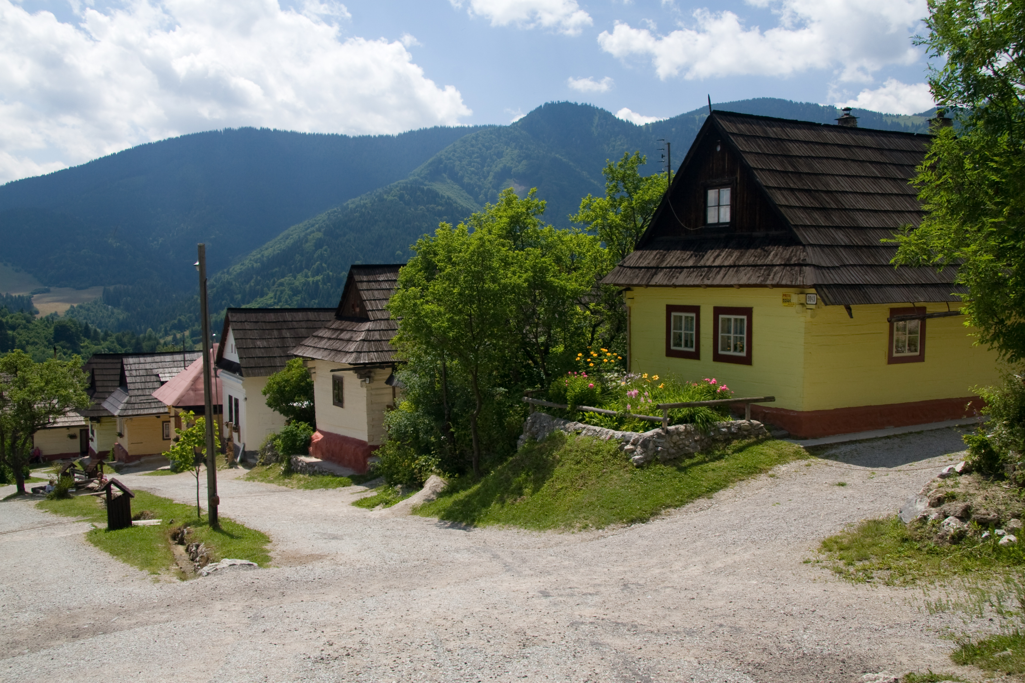 Vlkolínec